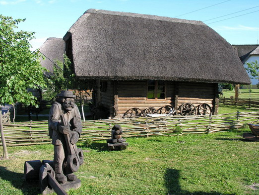 Padvariai, Kretingos raj.. Kaimo turizmo sodyba. Foto: Algirdas, 2006 m. birželio 29 d., lietuva